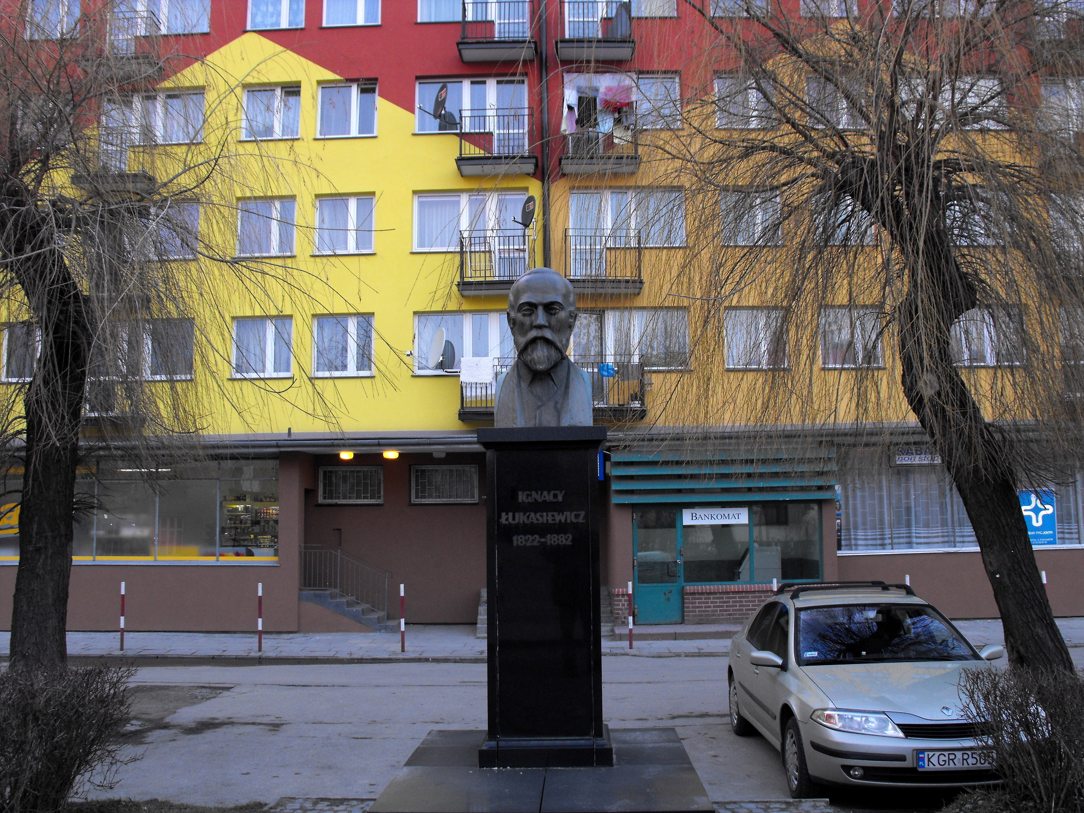 Pomnik Ignacego Łukasiewicza w Gorlicach